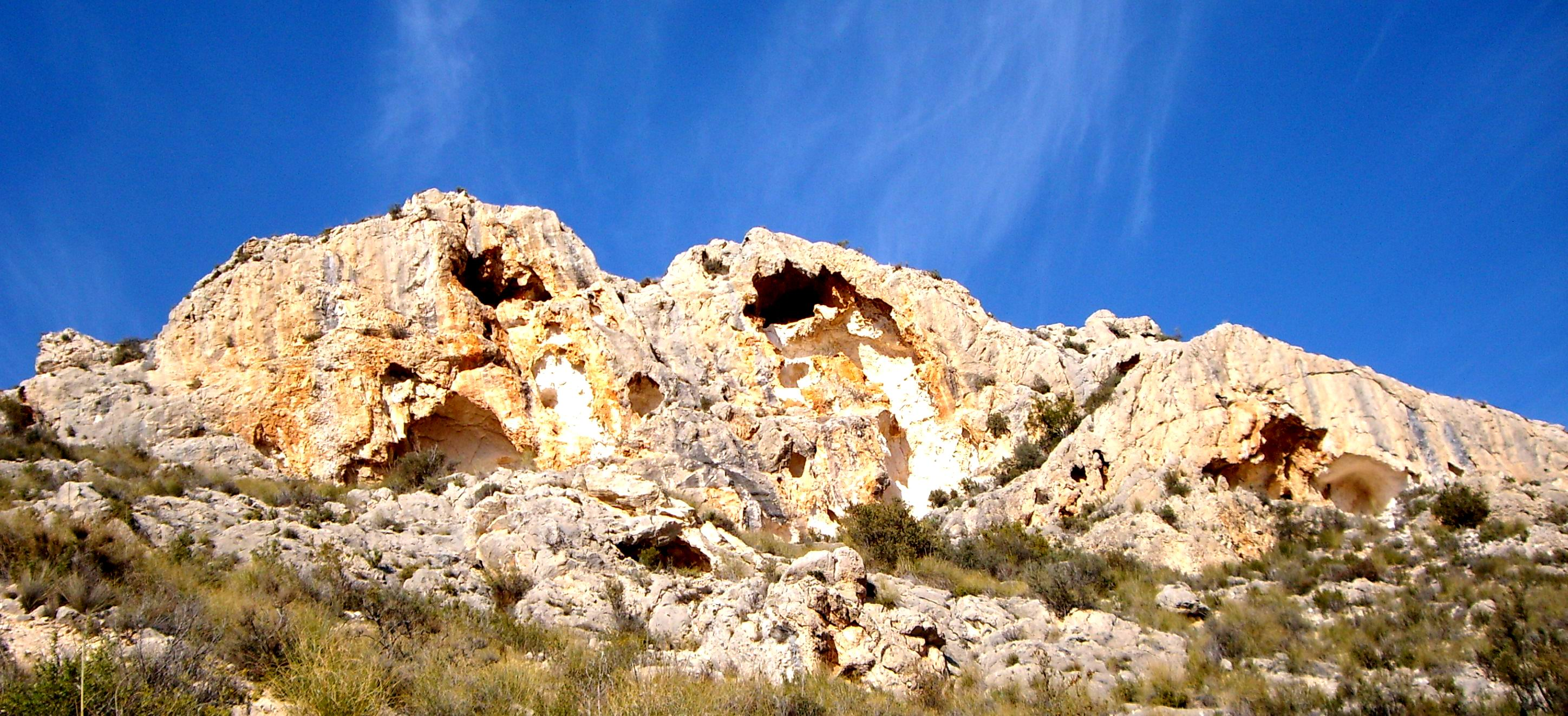 Formación karstica en Bolón, Elda.